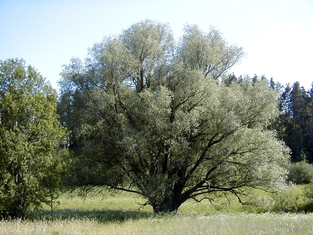 Ape, Latvijas lielākais vītols. 1999-06-19